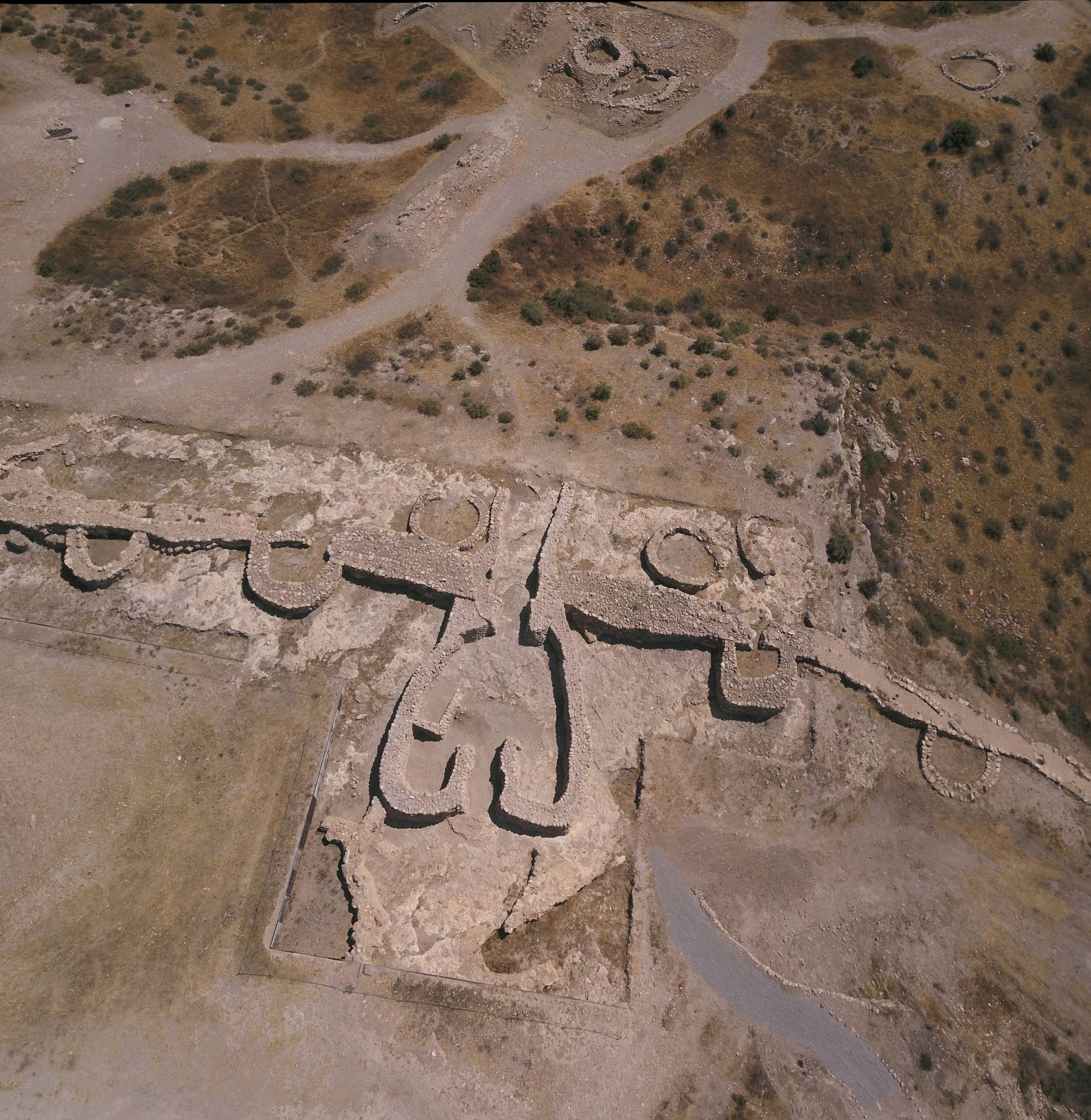 Enclave Arqeuológico de Los Millares. Vista aérea de la puerta principal o barbacana